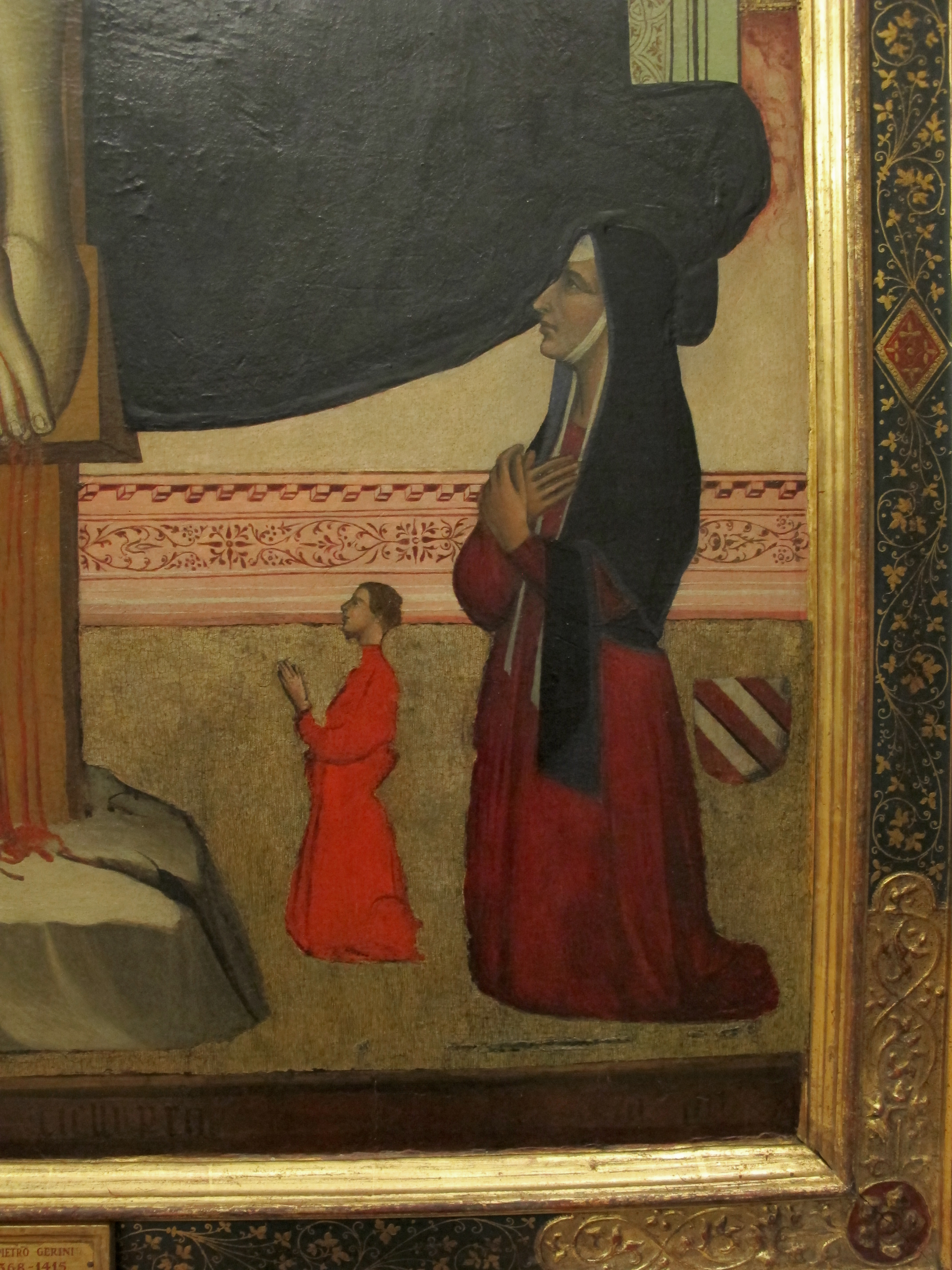 Musei Capitolini (Roma)